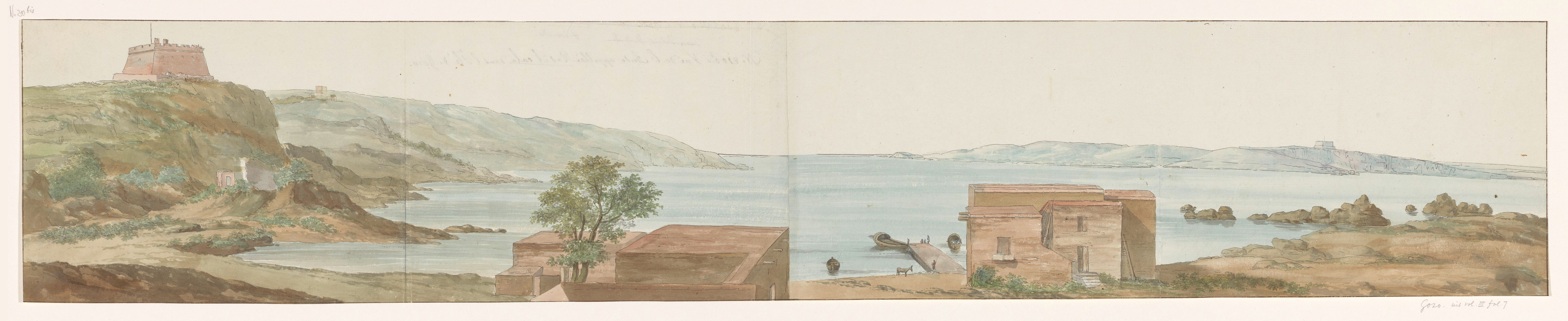 IdentificatieTitel(s): Gezicht op baai Ras il cala op eiland GozoVue de l'Anse appelée Ras il cala dans l'île de Ghozo (titel op object)Voyage en Italie, en Sicile et à Malte - 1778 (serietitel)Objecttype: tekening aquarel Objectnummer: RP-T-00-494-7Catalogusreferentie: Niemeijer&De Booy 264Opschriften / Merken: opschrift, verso linksboven, handgeschreven: ‘No 201 Vue de l'Anse appelée Ras il cala dans l'île de Ghozo’ (mogelijk nr. 210 bis)Omschrijving: Tekening uit het album 'Voyage en Italie, en Sicile et à Malte', 1778.VervaardigingVervaardiger: tekenaar: Louis DucrosDatering: 1778Fysieke kenmerken: zwart krijt, aquarel en penseel en pen in grijsMateriaal: papier krijt waterverf Techniek: penseel / penAfmetingen: blad: h 182 mm × b 992 mmVerwerving en rechtenCredit line: Schenking van mevrouw Hansen-van den Brugghen, Den HaagVerwerving: schenking 1948Copyright: Publiek domein